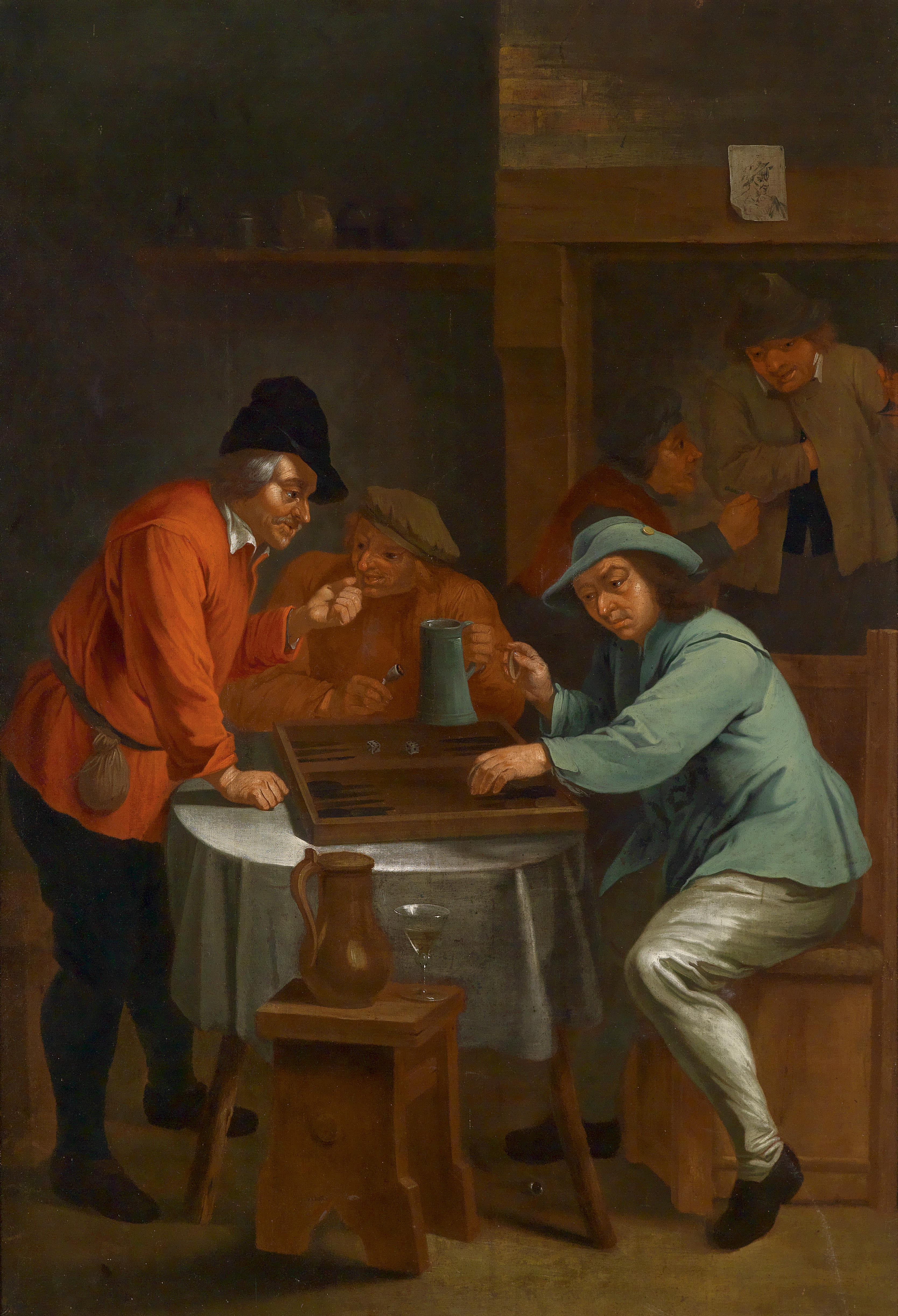 Wirtshausszene, Öl auf Leinwand, 145 x 100 cm